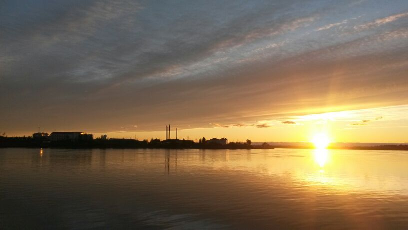 Устье р.Ясачной